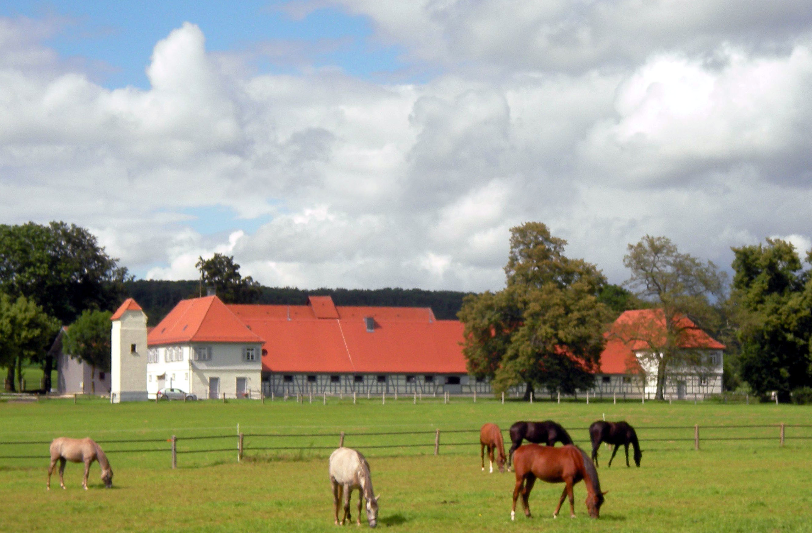 Haupt- und Landgestüt Marbach, Fohlenhof St. Johann